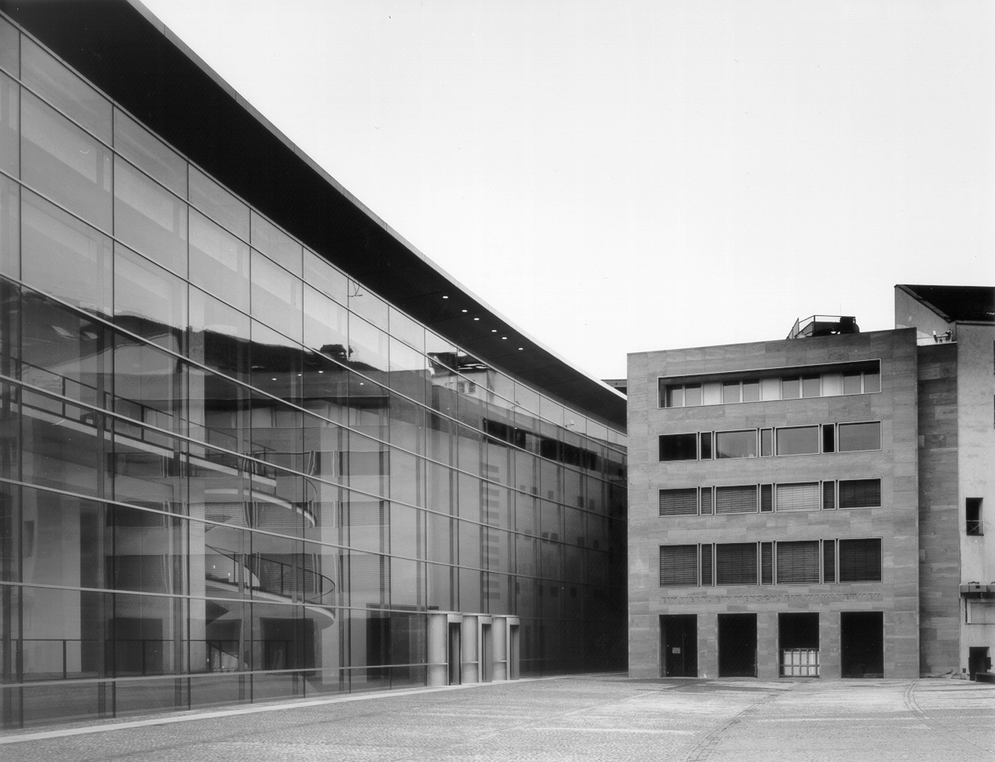 Neues Museum Nürnberg Aussenansicht